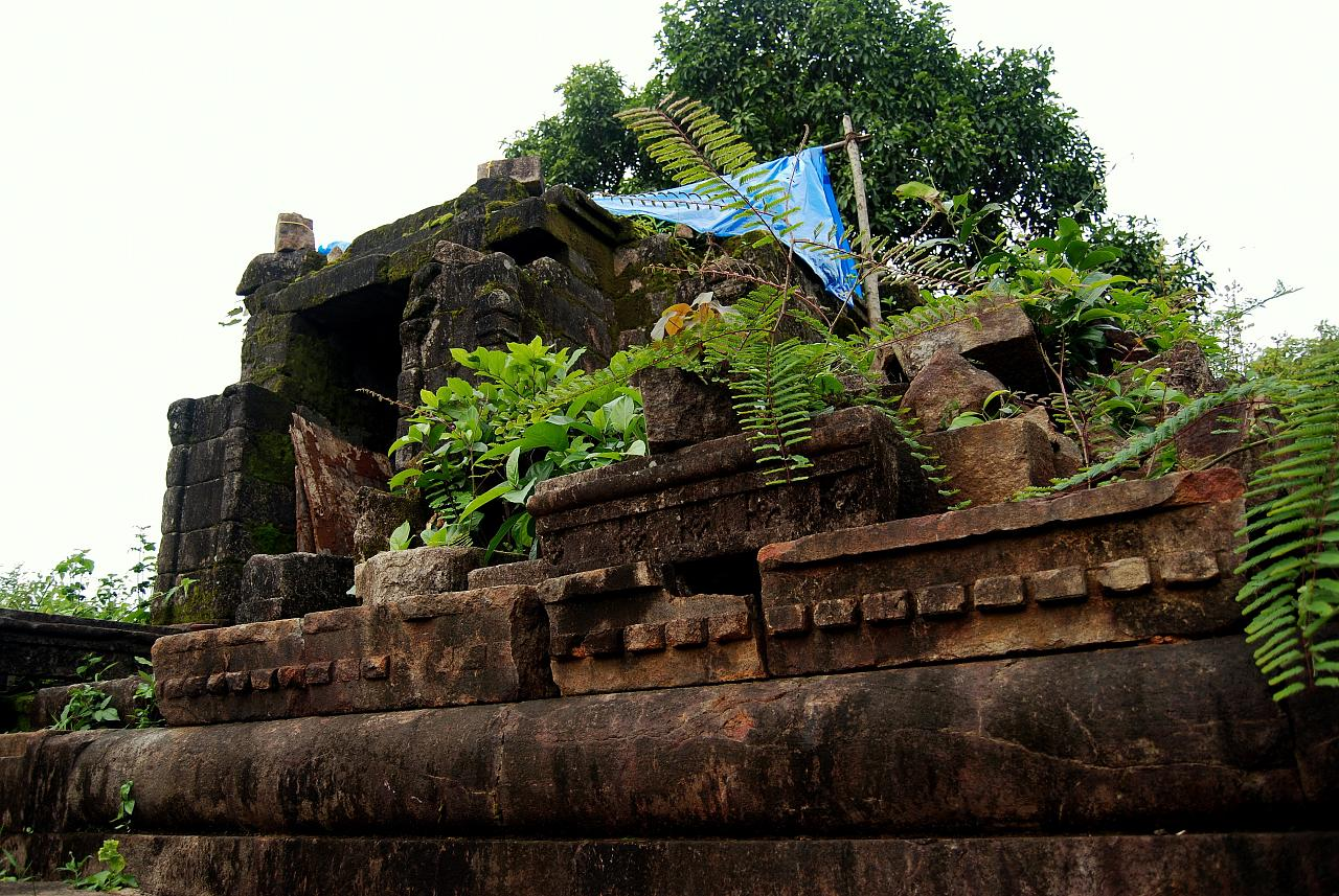 News From Mathrubhumi കൊണ്ടോട്ടി: പ്രസിദ്ധമായ ഊരകം തിരുവര്‍ച്ചനാംകുന്ന്‌ (തിരുവോണംമല) കയറ്റം ഇന്ന്‌. 2500 വര്‍ഷത്തോളം പഴക്കമുണ്ടെന്ന്‌ വിശ്വസിക്കപ്പെടുന്ന ക്ഷേത്രത്തിലേക്ക്‌ ചെങ്കുത്തായ കയറ്റംകയറി വ്യാഴാഴ്‌ച ആയിരങ്ങളെത്തും. മലയുടെ മുകളില്‍ സ്ഥിതിചെയ്യുന്ന ശങ്കരനാരായണ സ്വാമി, ആദിശാസ്‌താവ്‌ ക്ഷേത്രങ്ങളില്‍ ദര്‍ശനം നടത്തുന്നത്‌ കുടുംബക്ഷേമം, സന്താനലബ്ധ്‌ധി, രോഗപ്രതിരോധം, ദാമ്പത്യ സൗഖ്യം എന്നിവ പ്രദാനം ചെയ്യുമെന്നാണ്‌ വിശ്വാസം. ജില്ലയിലെ ഏറ്റവും ഉയരംകൂടിയ മലയാണ്‌ തിരുവര്‍ച്ചനാംകുന്ന്‌. ചുറ്റുപാടും മലകളാല്‍ ചുറ്റപ്പെട്ട്‌ കിടക്കുന്ന ഈ ക്ഷേത്രത്തിന്റെ ചുവരുകള്‍ കരിങ്കല്ലില്‍ കൊത്തിയുണ്ടാക്കിയതാണ്‌. മറ്റു ക്ഷേത്രങ്ങളില്‍നിന്ന്‌ വ്യത്യസ്‌തമായി പടിഞ്ഞാറോട്ട്‌ മുഖമായാണ്‌ തിരുവര്‍ച്ചനാംകുന്ന്‌ ക്ഷേത്രം. കോഴിക്കോട്‌ - മലപ്പുറം റോഡില്‍ കോളനി റോഡില്‍നിന്നും വേങ്ങര - മലപ്പുറം റോഡില്‍ പൂളാപ്പീസില്‍നിന്നും ക്ഷേത്രത്തിലെത്താം.